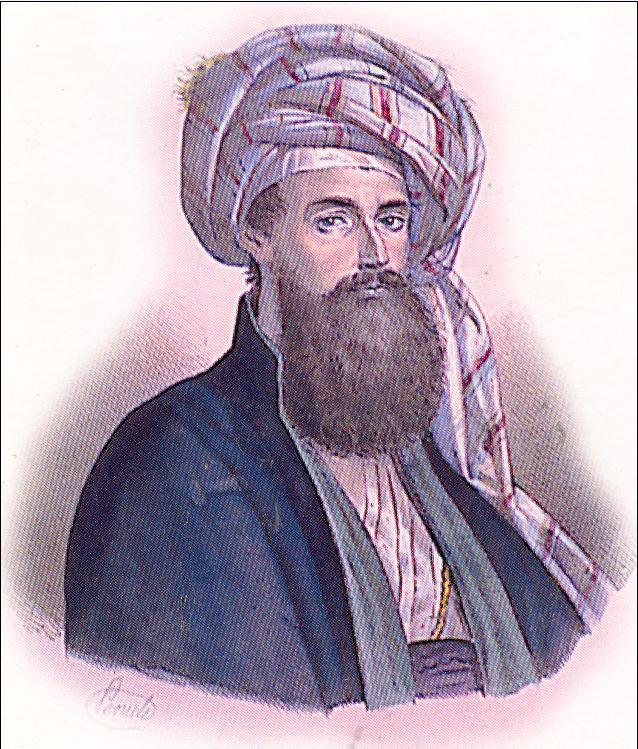 Don Angelo Vinco, missionario